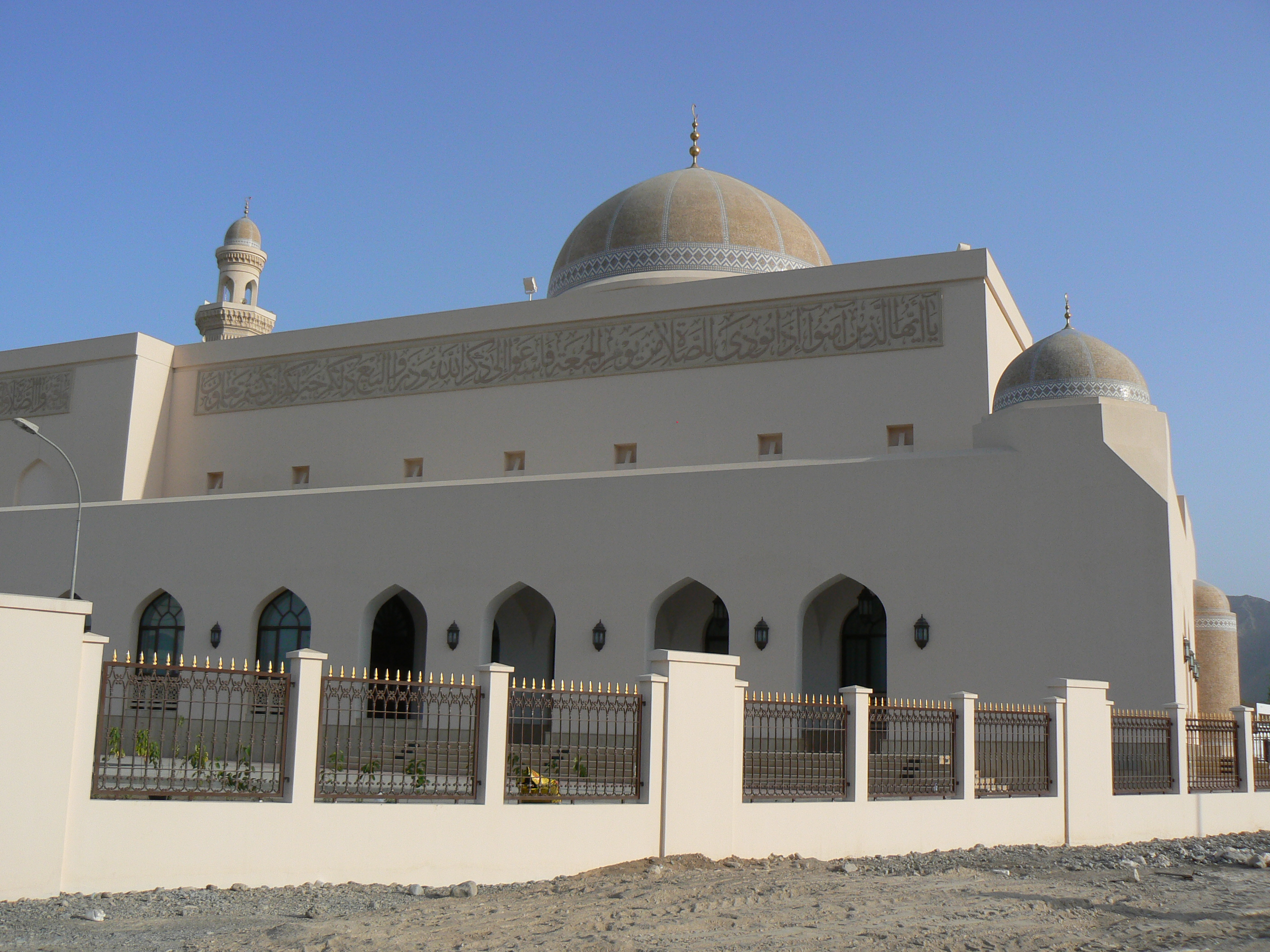 Al Maabilah, Seeb, Oman